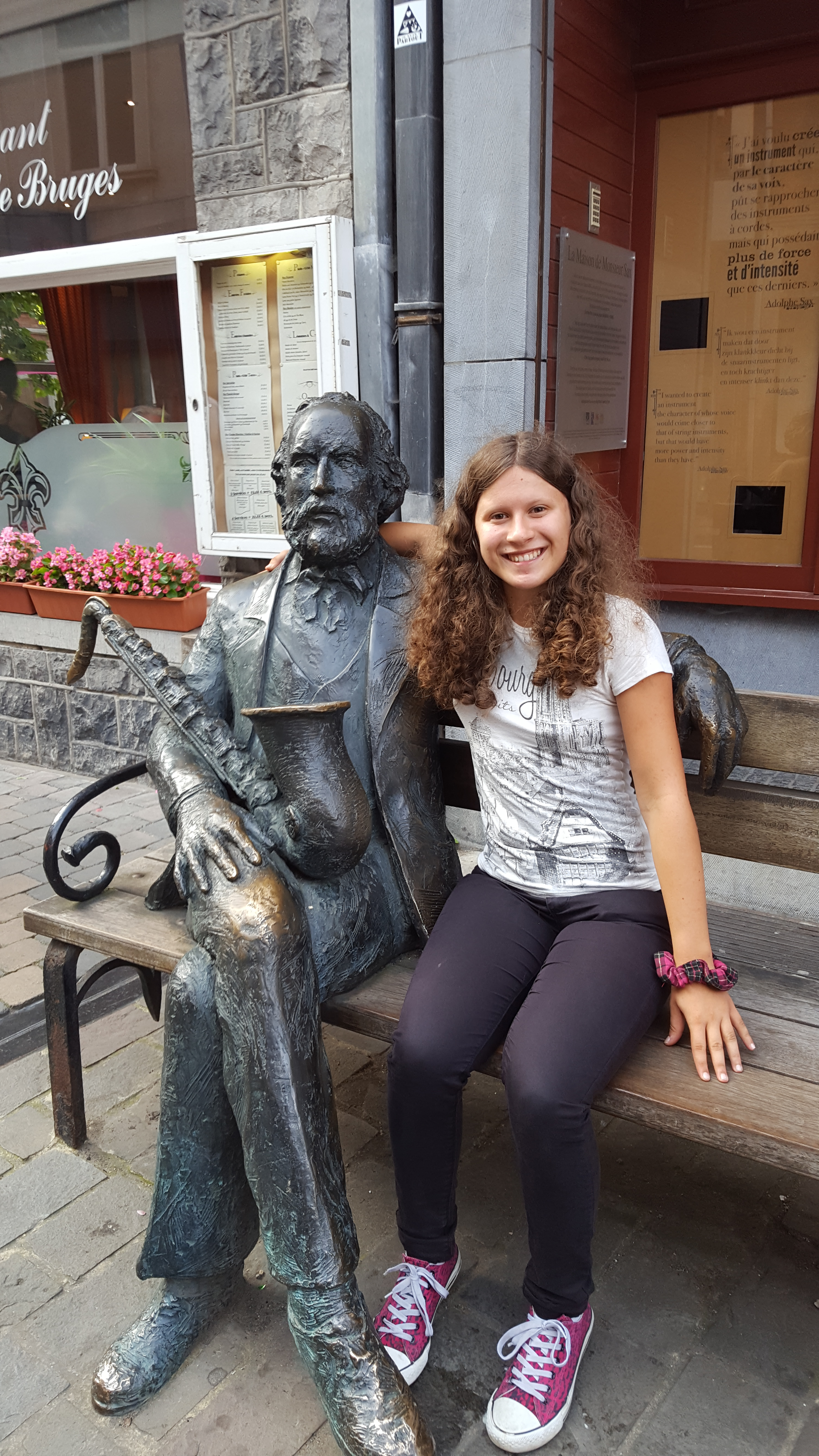 Lucia Böck 2016 mit der Adolphe Sax Statue in Dinant/Belgien